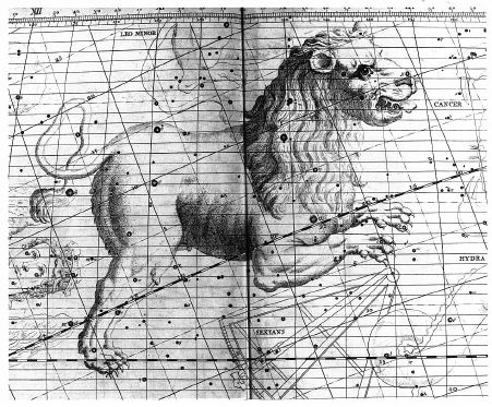 Leo